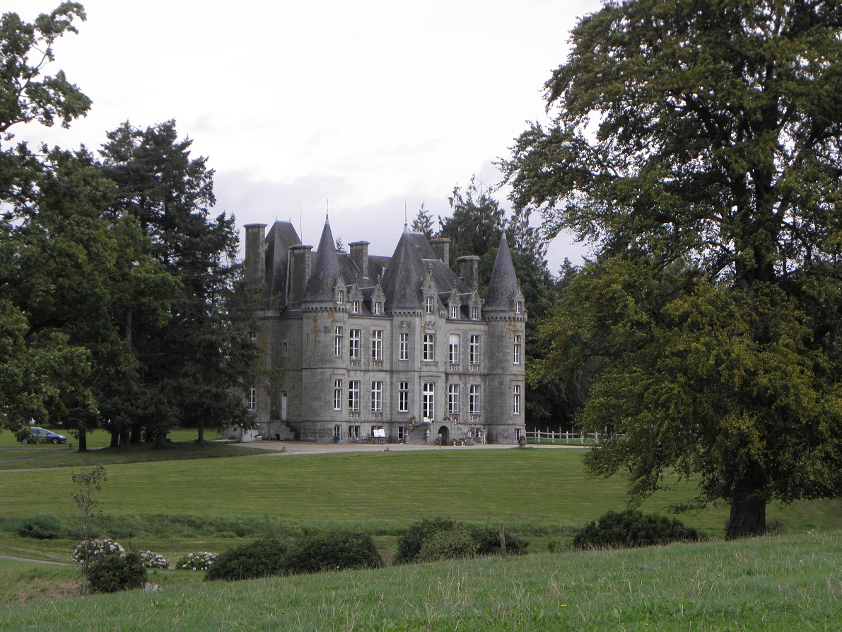 Château de La Vieuville en Le Châtellier (35)